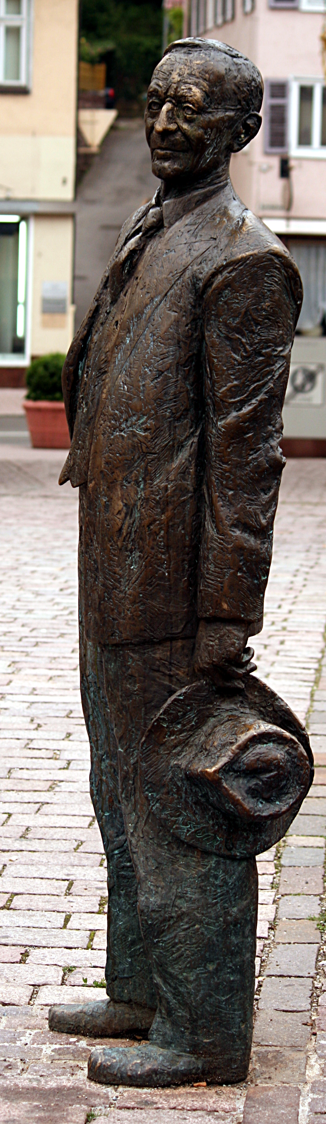 Calw_Nikolausbrücke,_Hermann_Hesse_Plastik